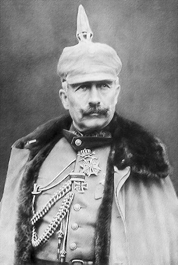 Keisari Vilhelm II